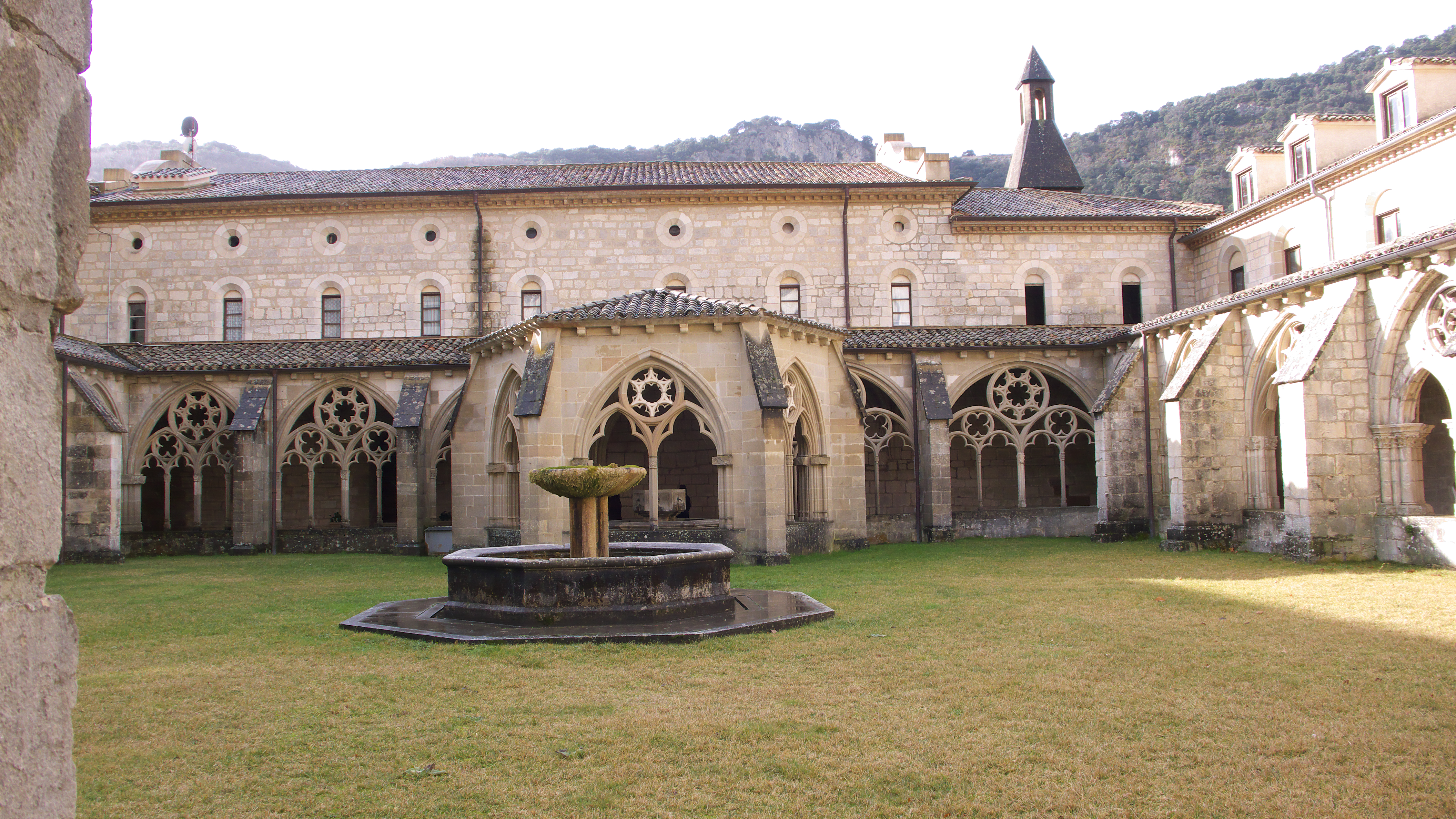 El Monasterio de Iranzu (1176). La Orden del Císter. El claustro (ss. XII-XIV) y el gótico cisterciense.